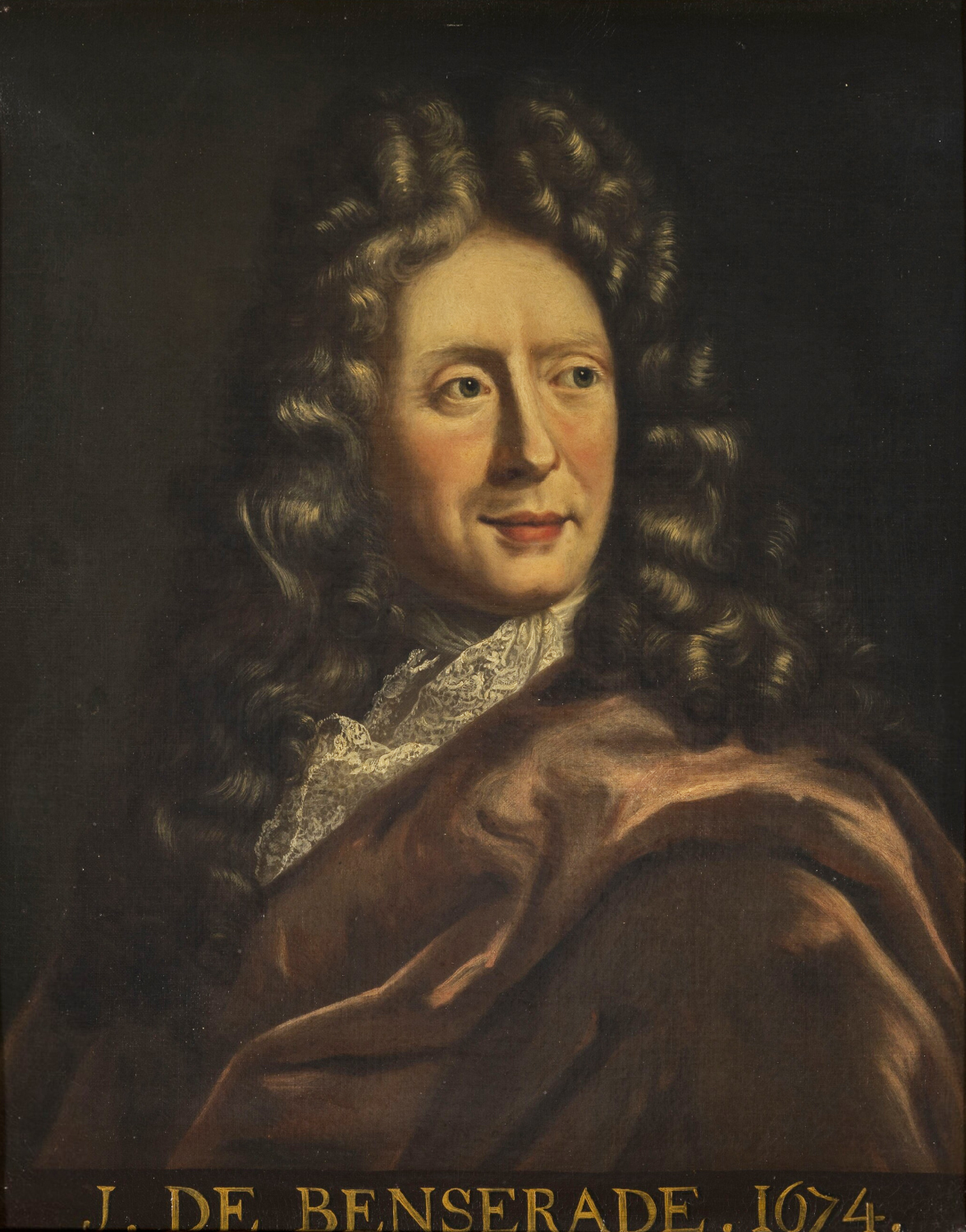 Der französische Dichter Isaac de Benserade (1612-1691)